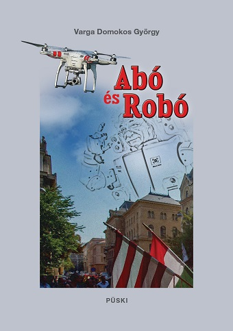 Varga Domokos György: Abó és Robó. (regény, Püski 2017)